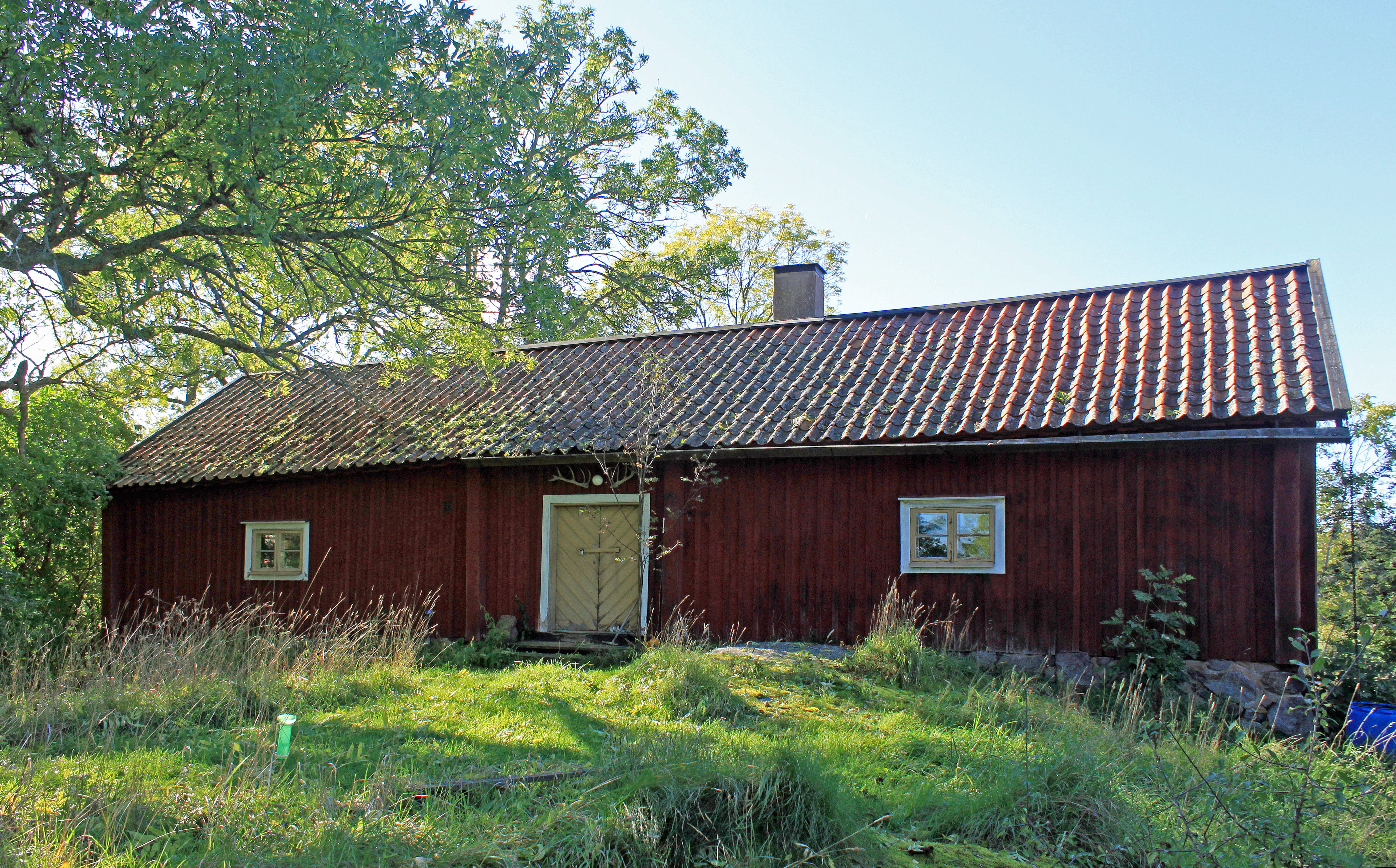 Framsidan av Lundby parstuga i Vällinge.